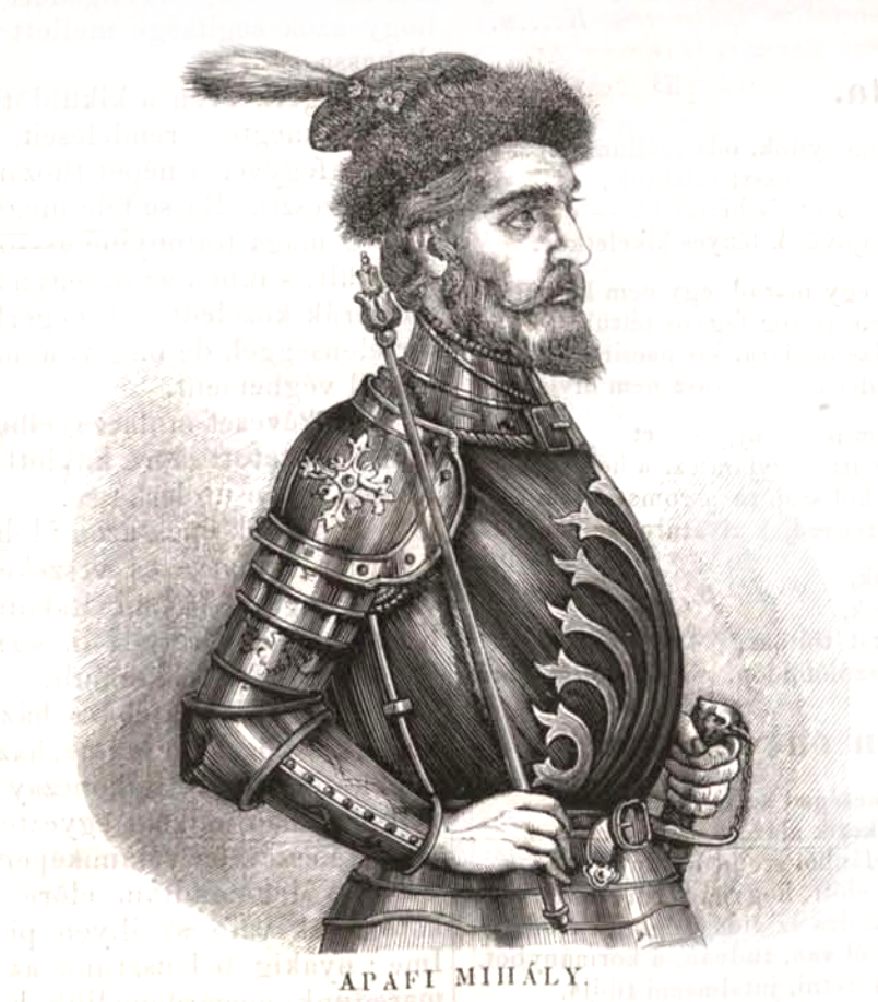 Apanagyfalvi I. Apafi Mihály (Ebesfalva, 1632. november 3. – Fogaras, 1690. április 15.) erdélyi fejedelem 1661-től haláláig.